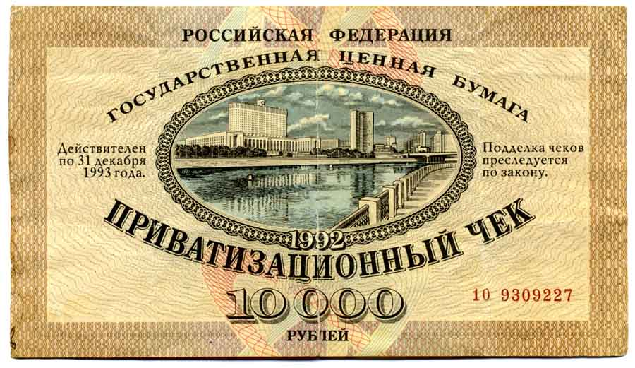 Ваучер 1992 года. Аверс.